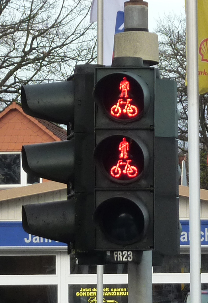 Ampel mit zwei Rot-Phasen für Fußgänger und Radfahrer